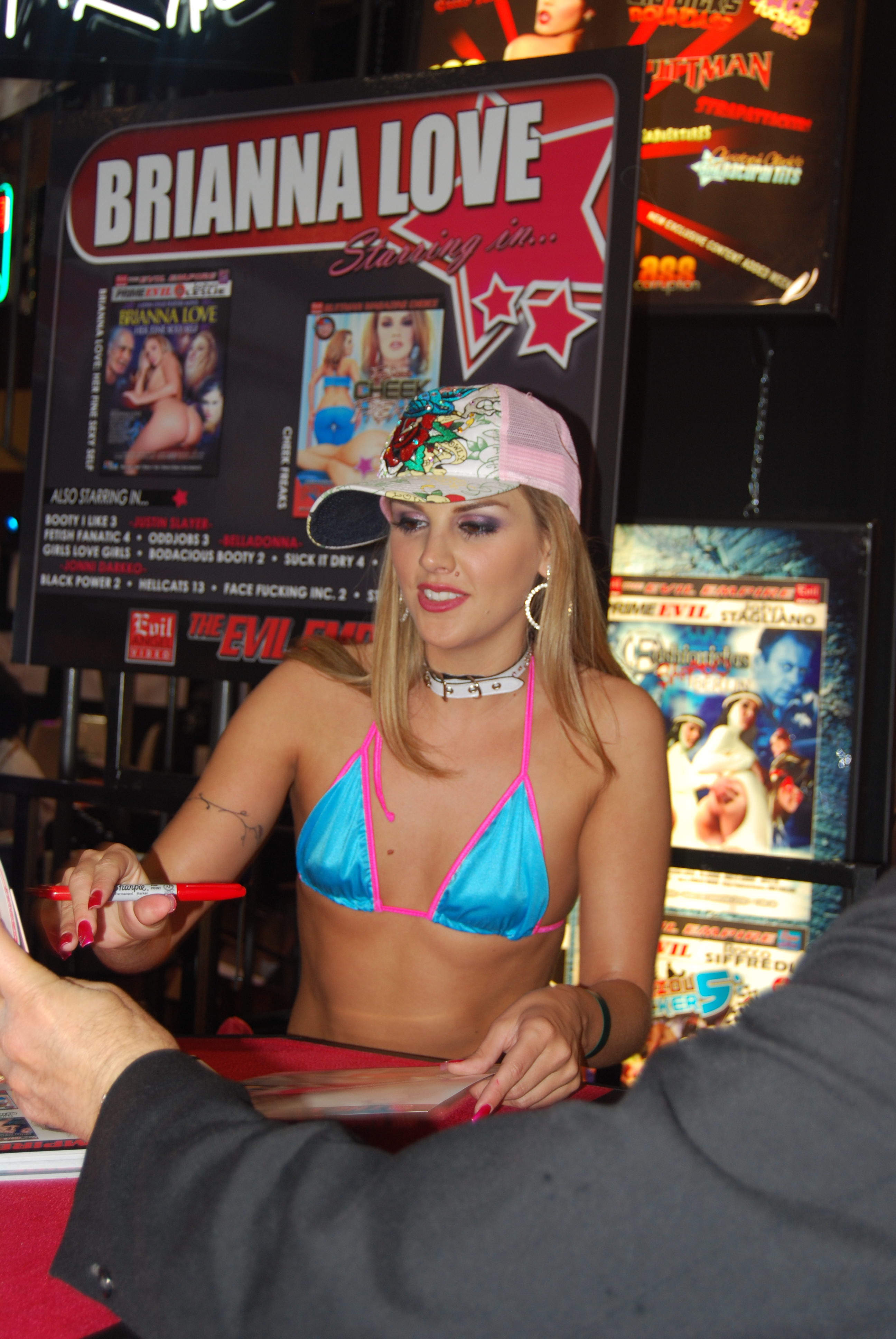 AEE2008_Nikon_Day2 555